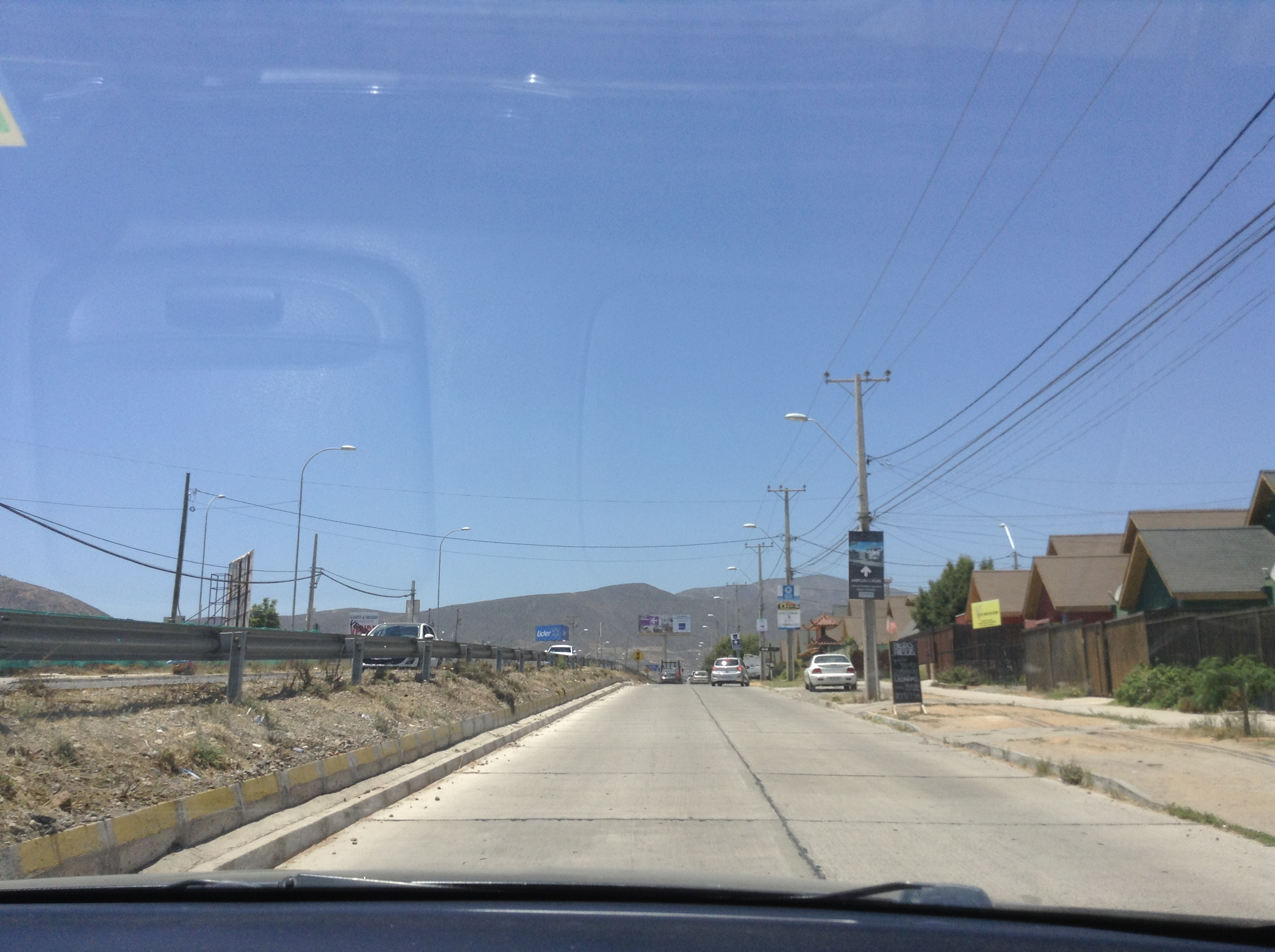 kkjihjhhg